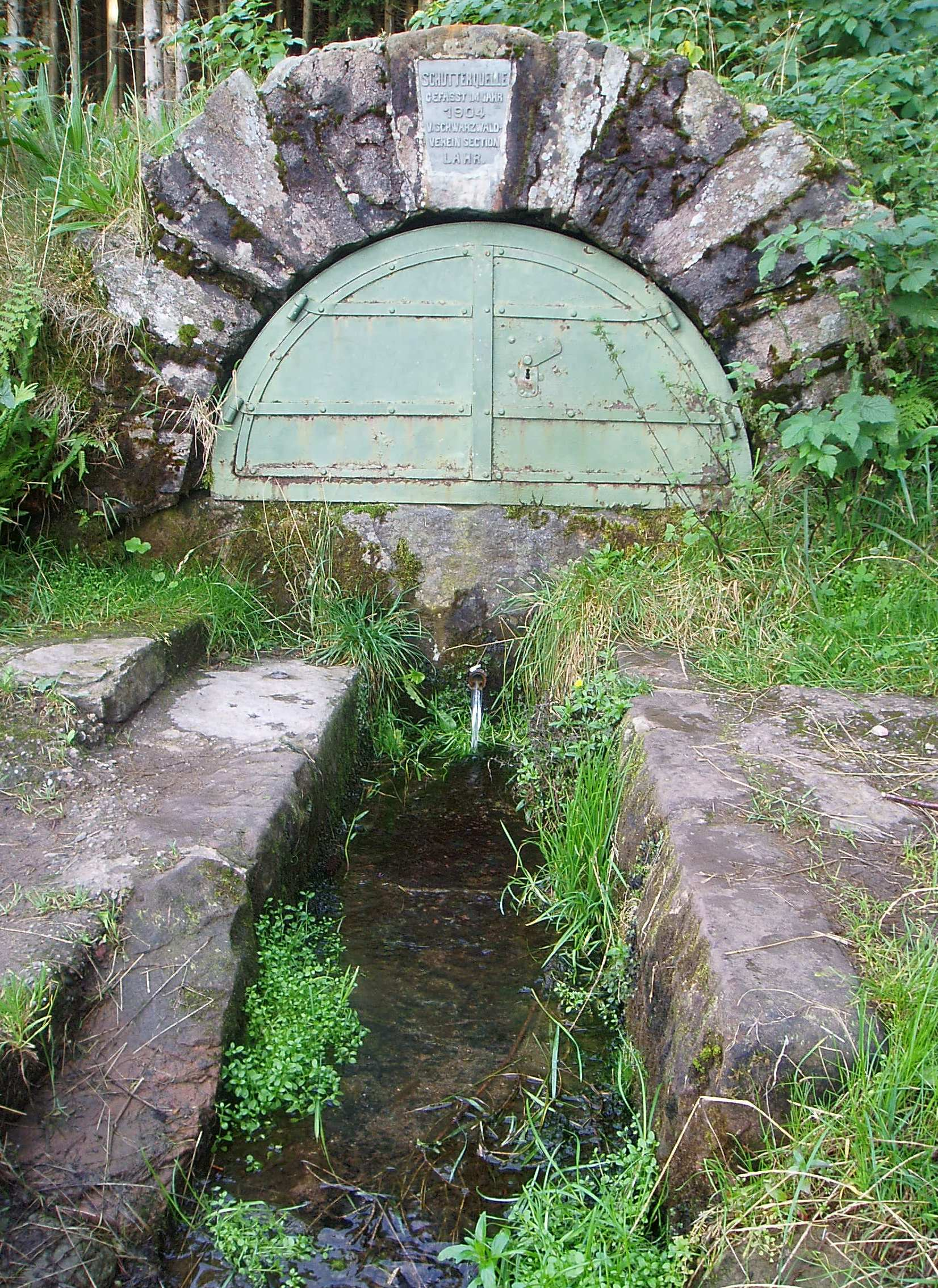 Schutterquelle, gefasst im Jahr 1904